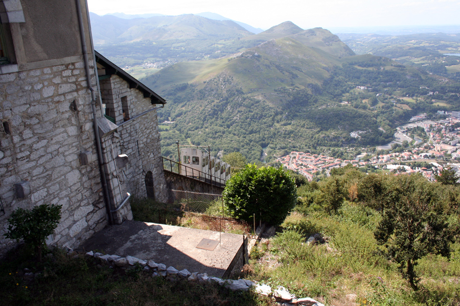 Funiculaire du Pic du Jer (Jer's peek funicular), Lourdes